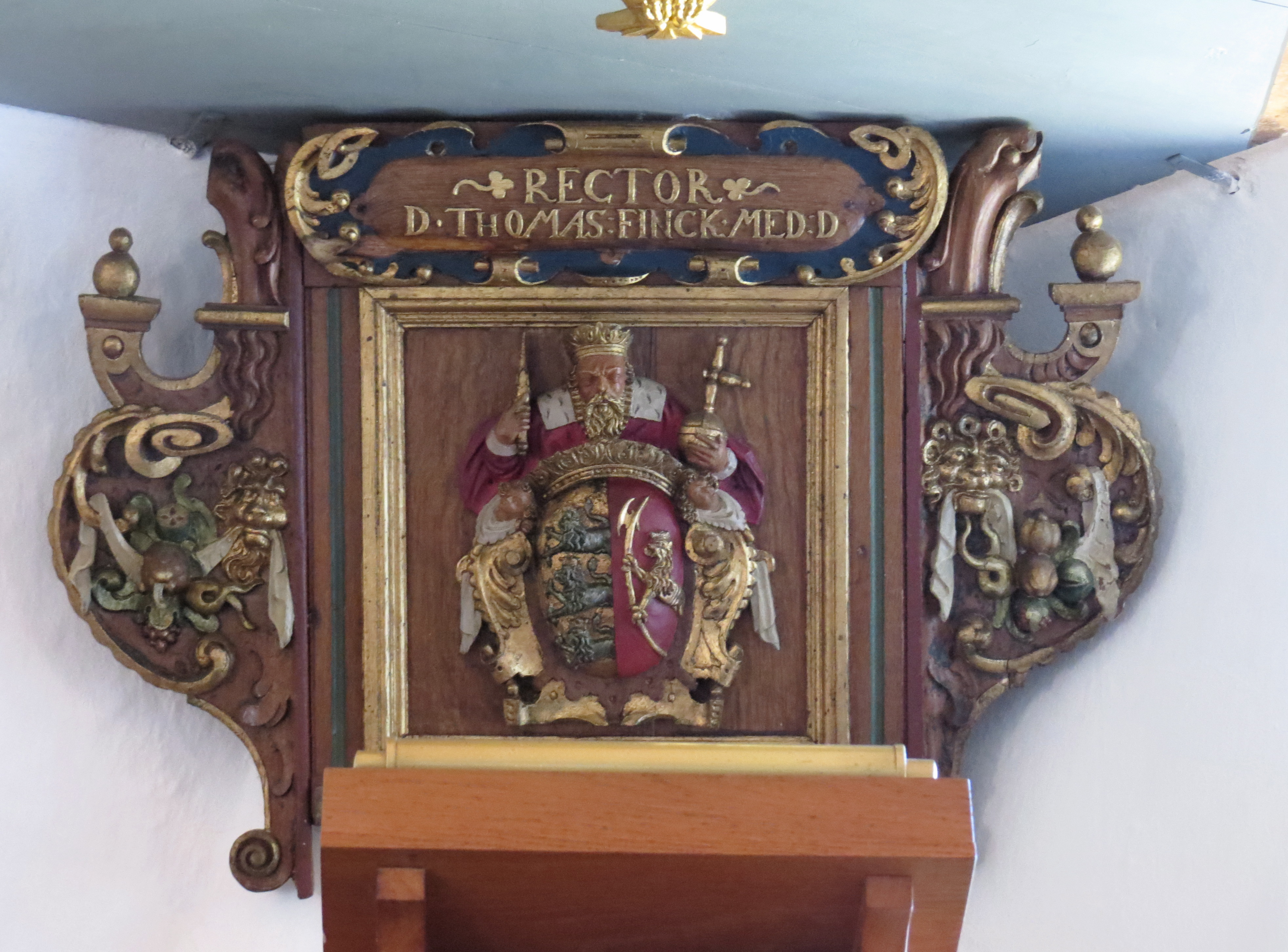 Rygskjold med Københavns Universitets våben samt indskriften Rector d[ominus] Thomas Finck med[icinae] d[octor]. Forneden ( ikke synligt på billedet) indskrift for magister Wolfgang Rhuman. Ganløse Kirke, Sjælland